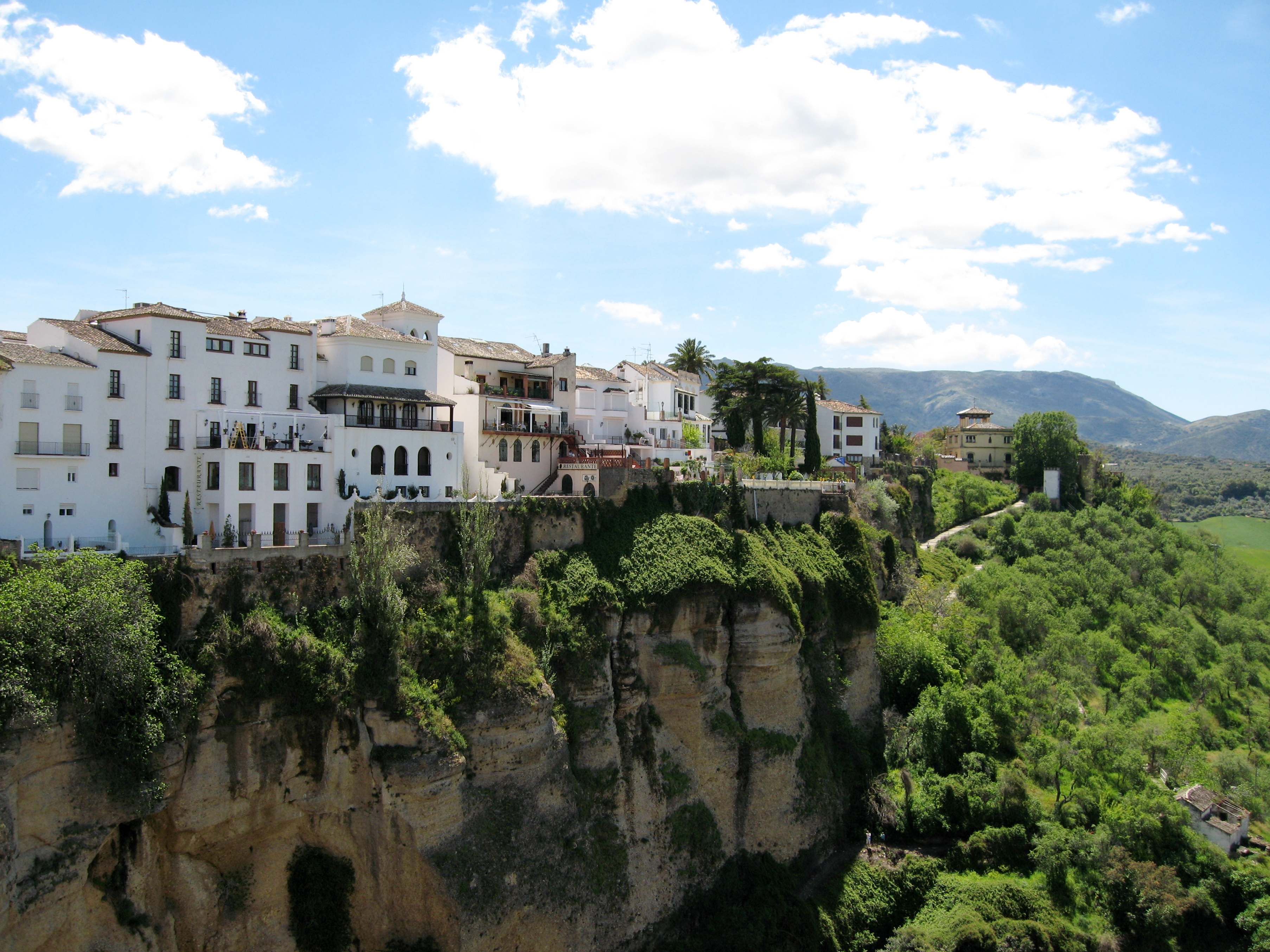 Westseite der Altstadt (La Ciudad) von Ronda, Provinz Málaga, Andalusien, Spanien